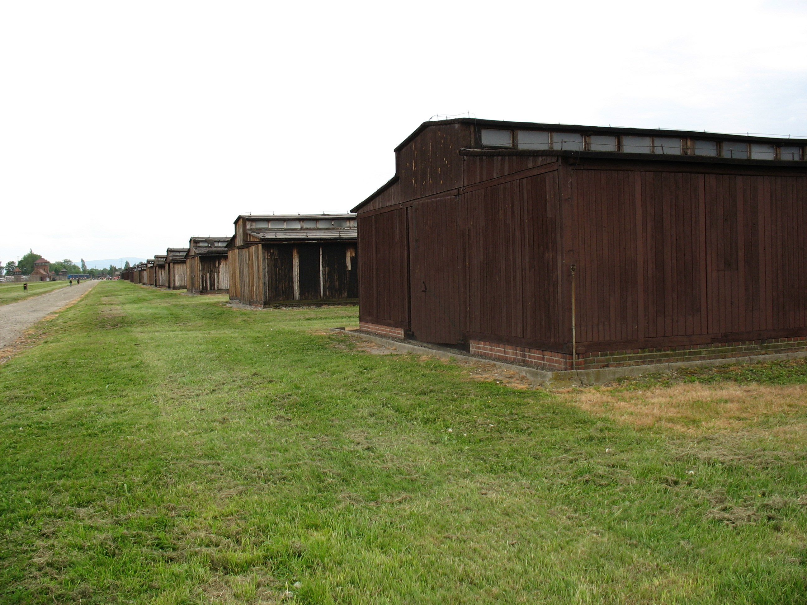 Odbudowany fragment baraków w byłym niemieckim hitlerowskim obozie KL Birkenau Autor: Sharx